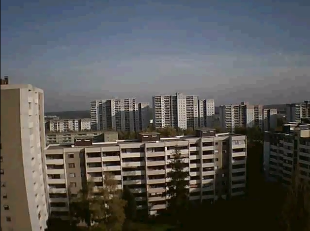 Ein Foto der Ausstellung 365Spessartviertel. Mehr Infos unter